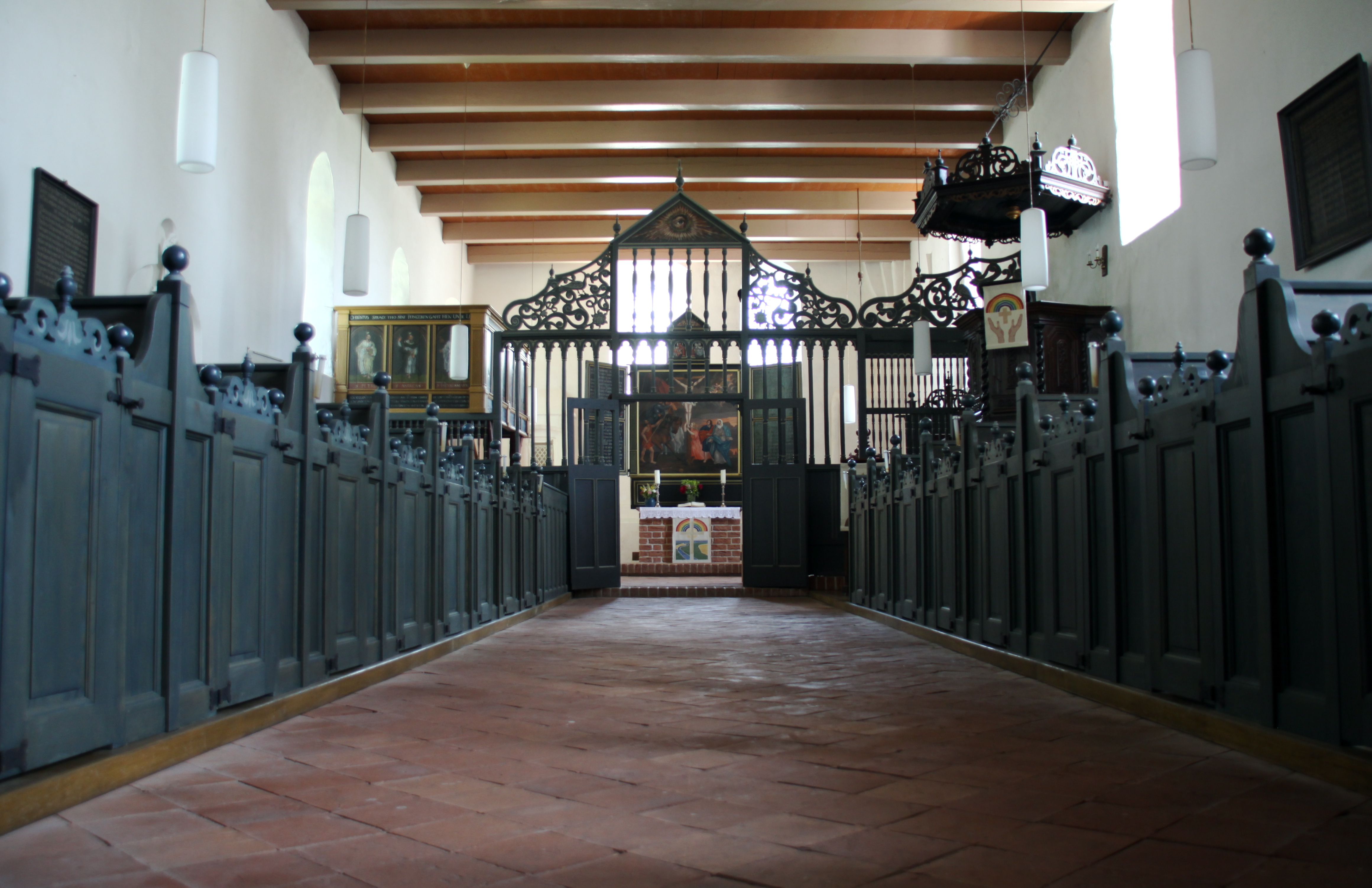 Innenraum der St.-Matthäus-Kirche (Resterhafe)